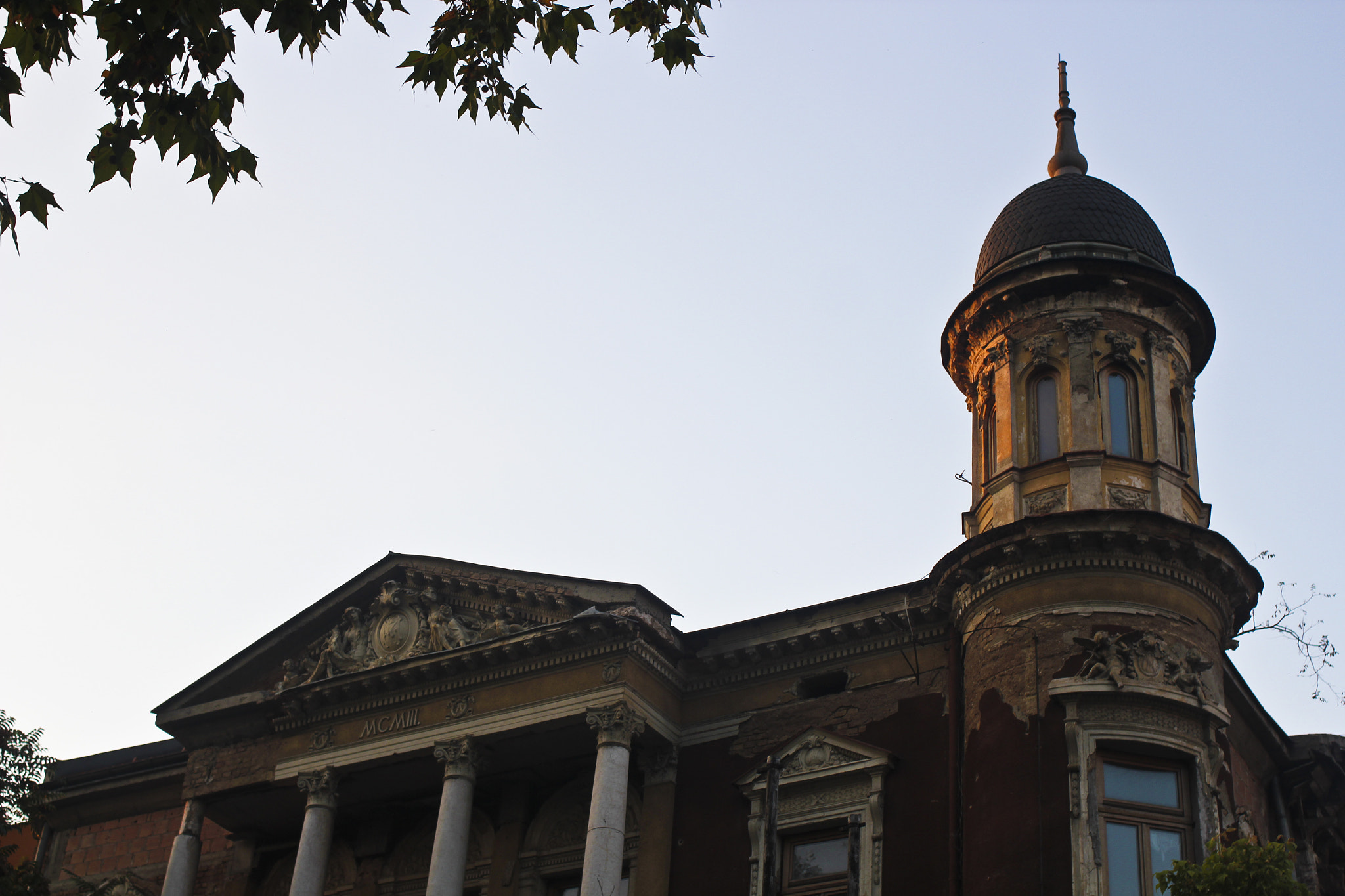 500px provided description: Sarajevo Bosnie Herzegovine O